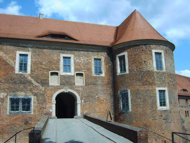 Torhaus Burg Eisenhardt, Belzig, Land Brandenburg, Deutschland, Bild aufgenommen am 1.7.2006 von Olaf Meister